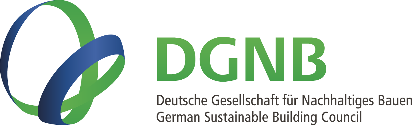 Logo Deutsche Gesellschaft für Nachhaltiges Bauen - DGNB e.V.